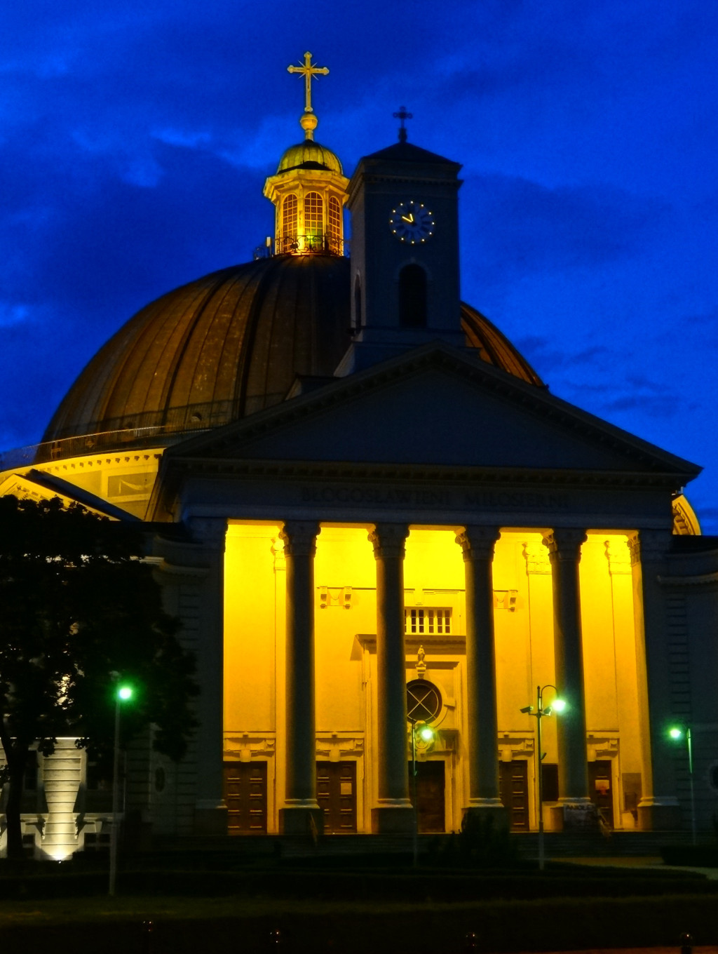 Bazylika św. Wincentego à Paulo w Bydgoszczy (budowana od 1925 r.)